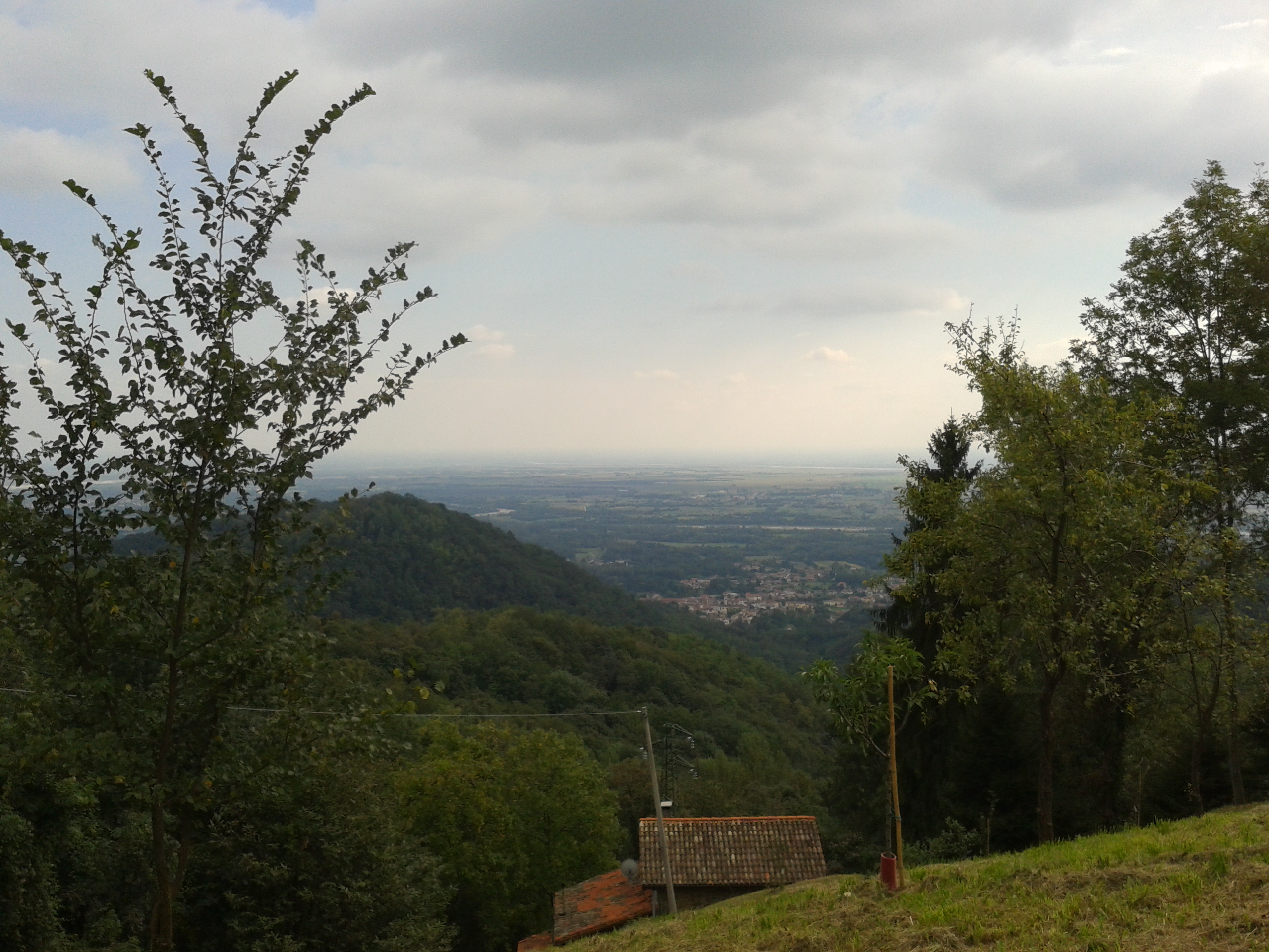 Furlan: Panorama di Fana dai cuei.